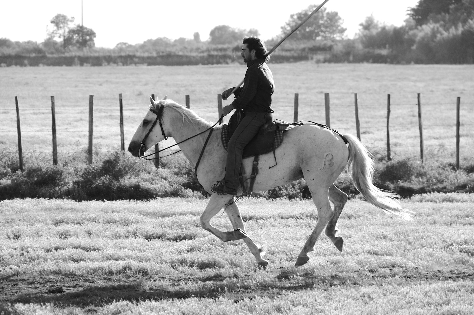 Bayle, gardian régisseur, galopant vers sa manade